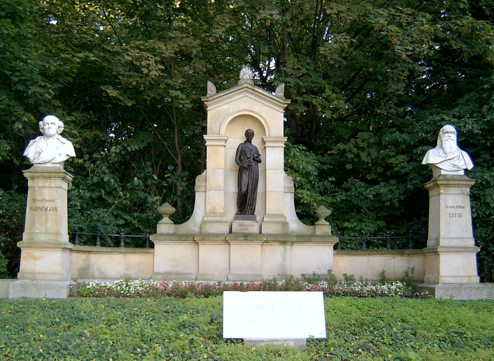 Denkmal für Arthur Lutze (1813–1870, rechts) und Samuel Hahnemann (links) in Köthen (Anhalt) in der Theaterstraße Ecke Springstraße.